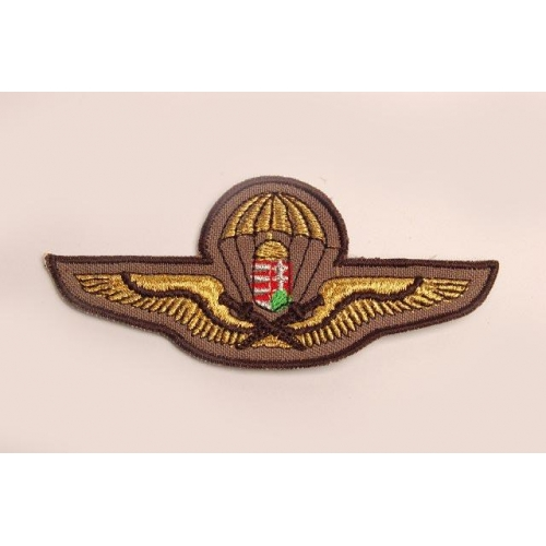 MH Tiszti ejtőernyős állományjelző